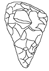 Neandertaler-Faustkeil